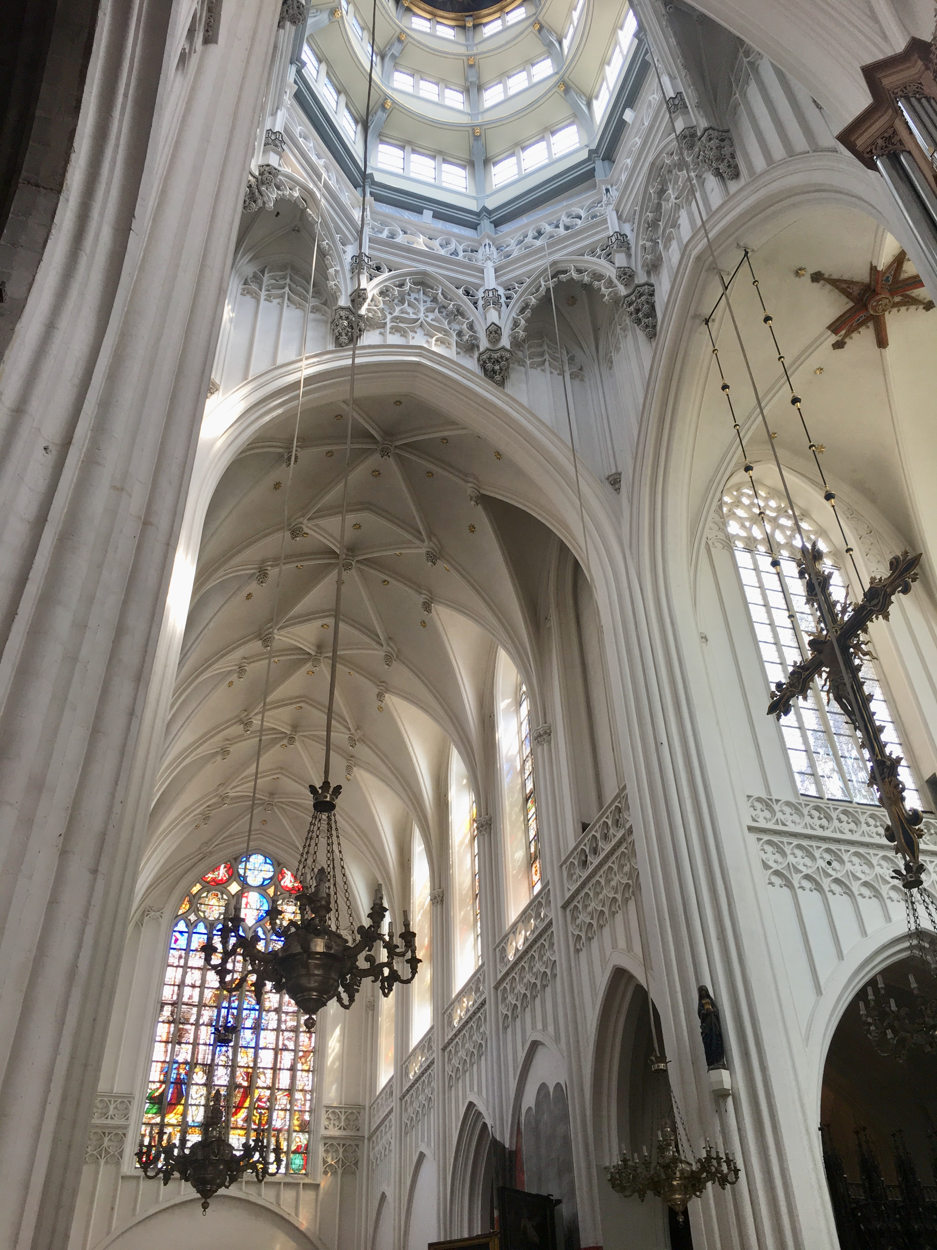 Cattedrale di Anversa, interno.